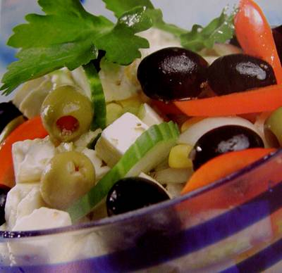 Greek salad